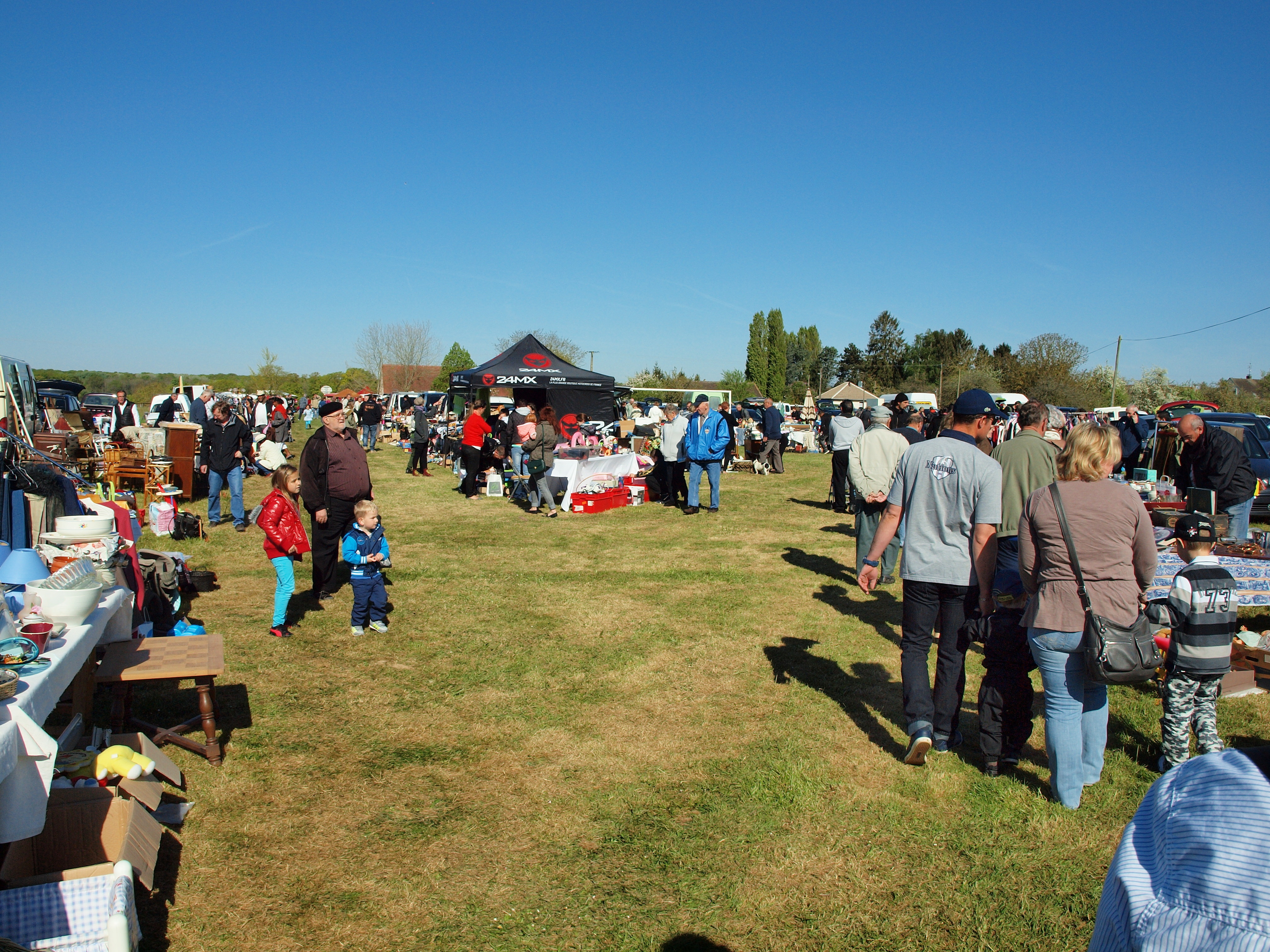 Meigneux (Seine-et-Marne, France)